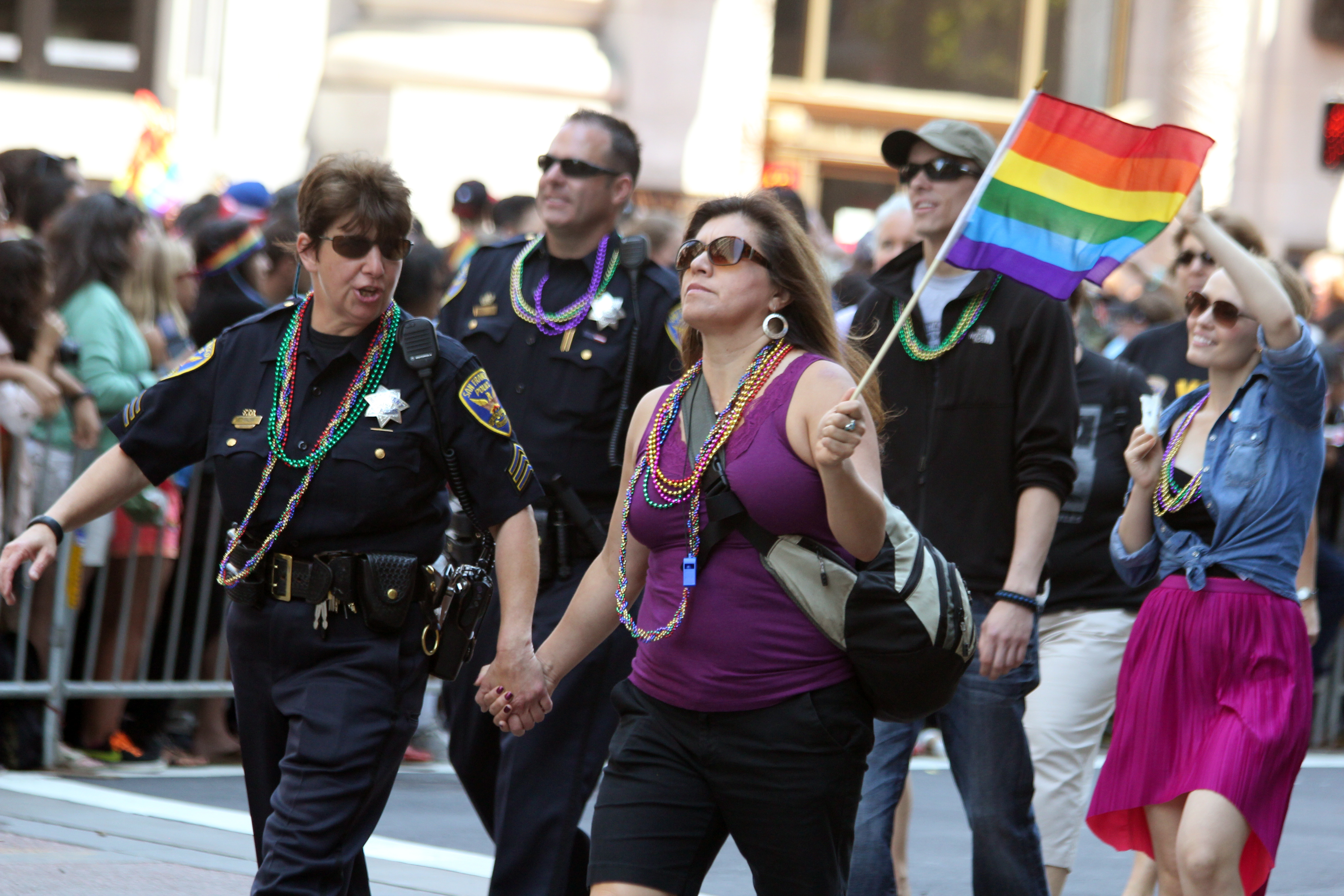 Police